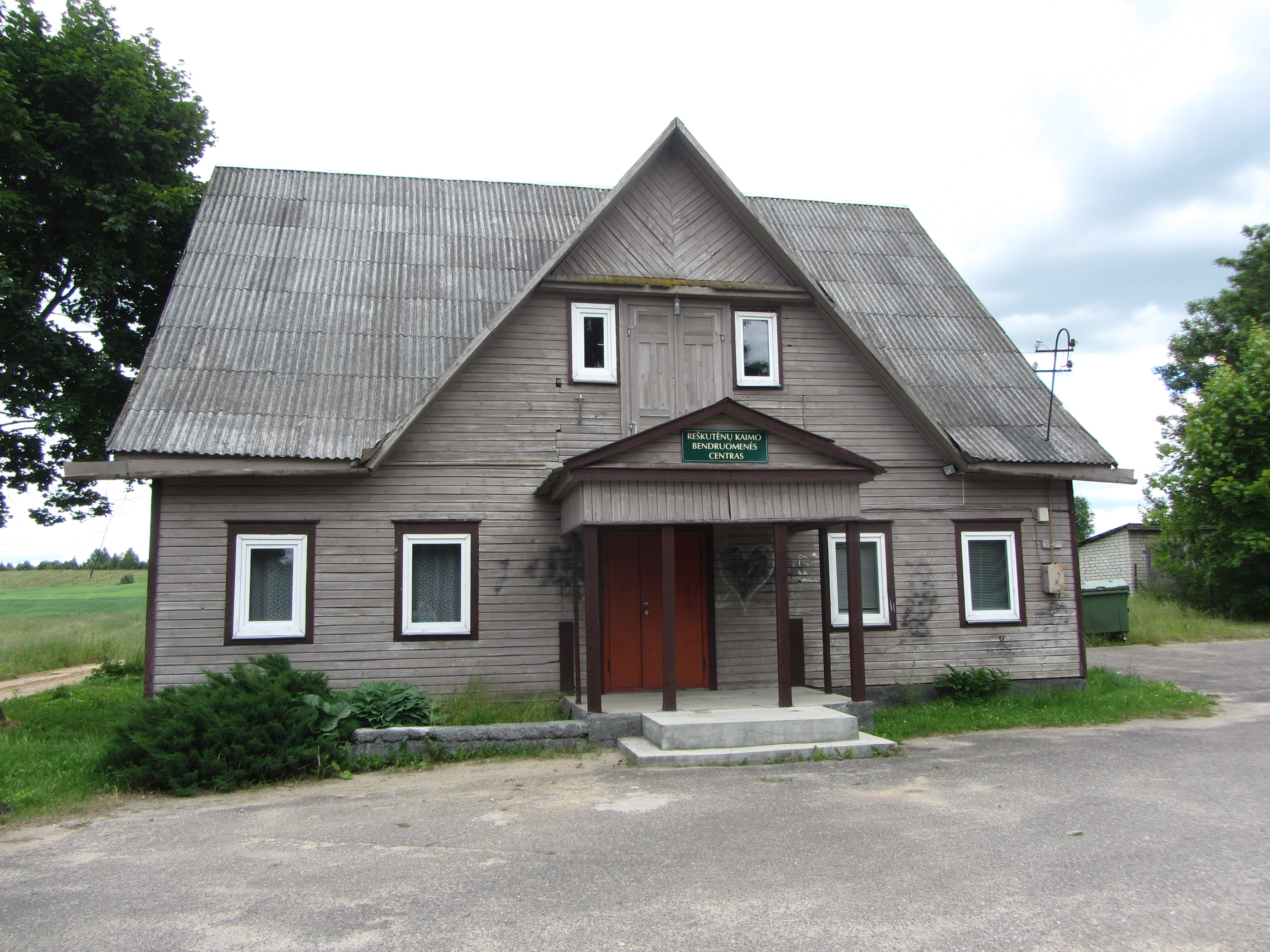 Reškutėnai 18204, Lithuania